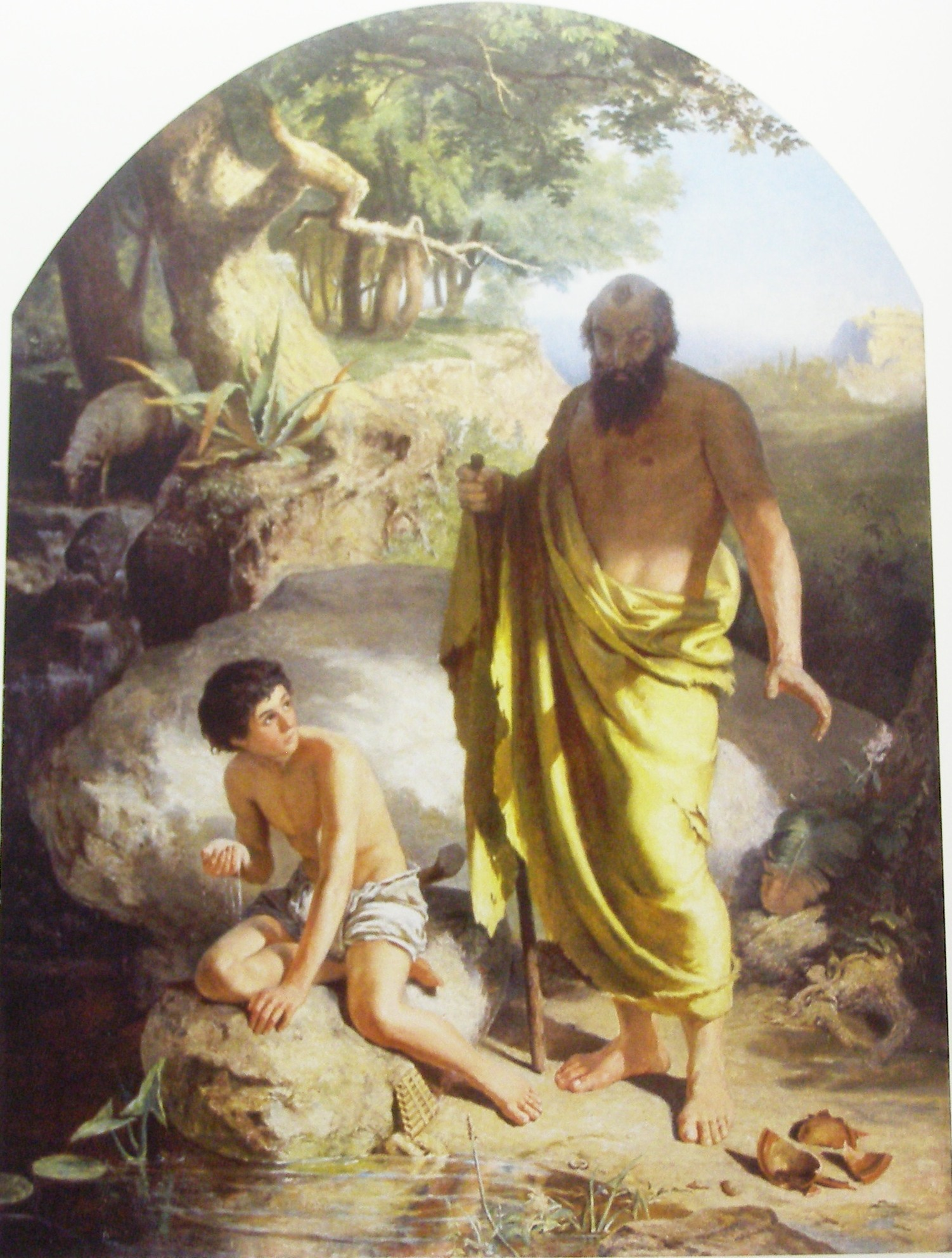 Конкурсная работа, выполненная в Академии художеств. 1868. Находится в частном собрании.